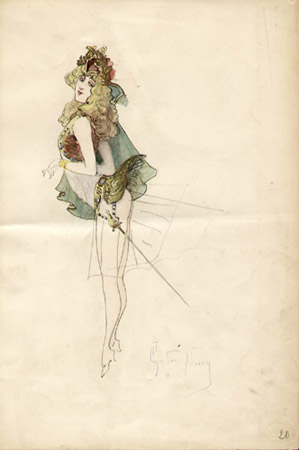 Costume design